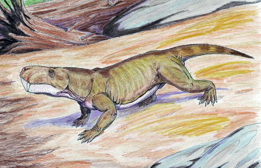 Арктогнат (реконструкция)